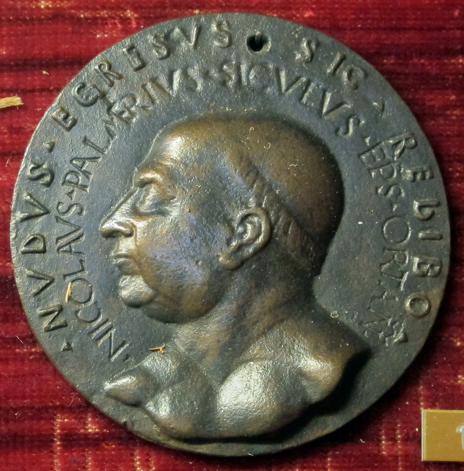 Medaglia di Niccolò Palmieri, vescovo di orte, 1463